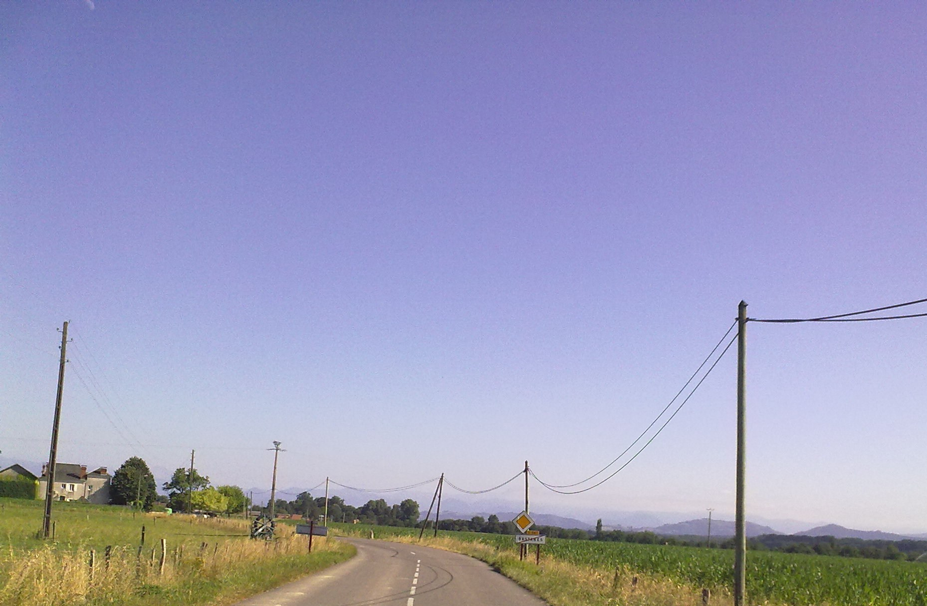 Bastanès le 18 juillet 2010, France.